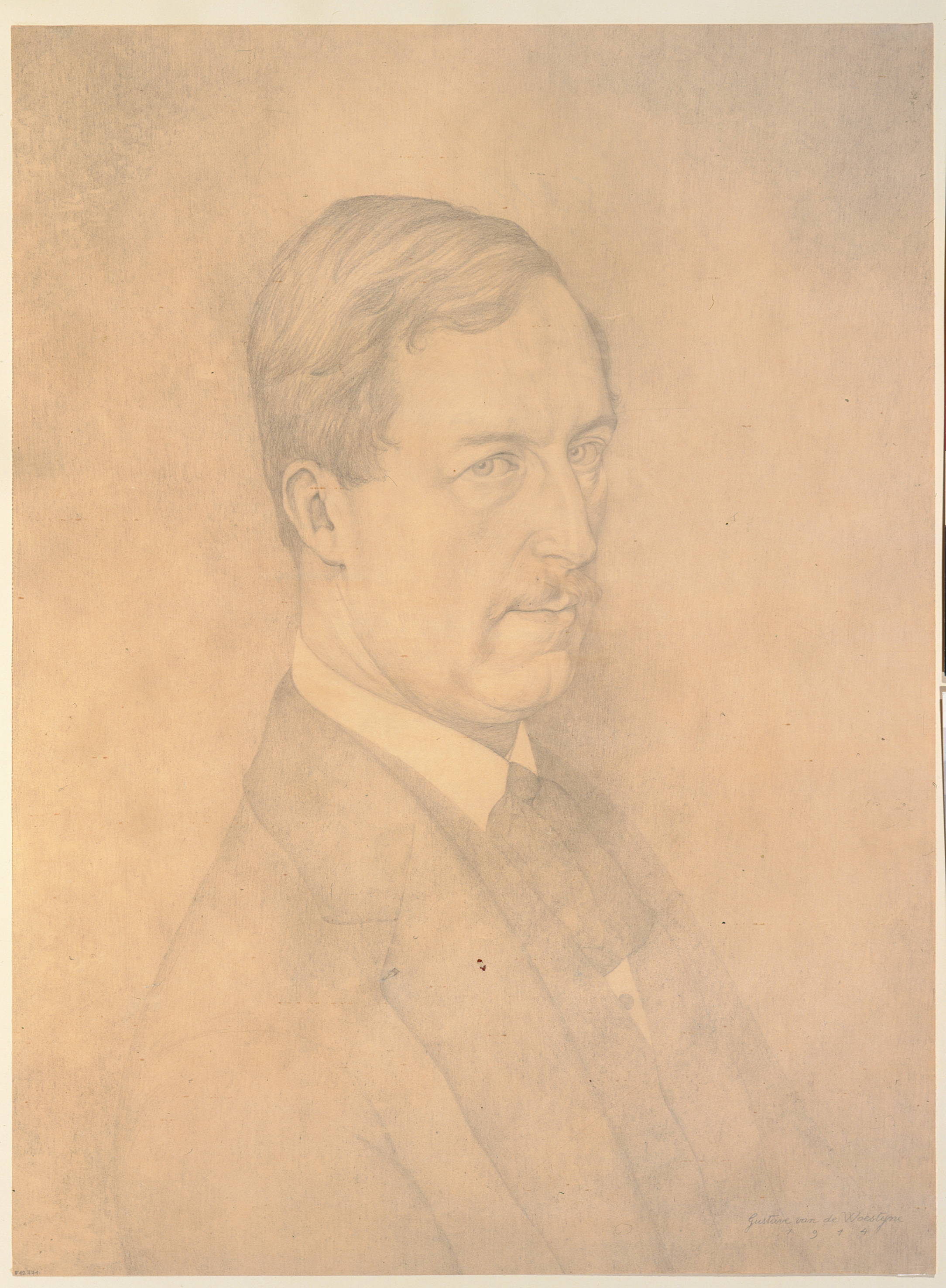 Dessin au crayon ; 66 x 48,5 cm